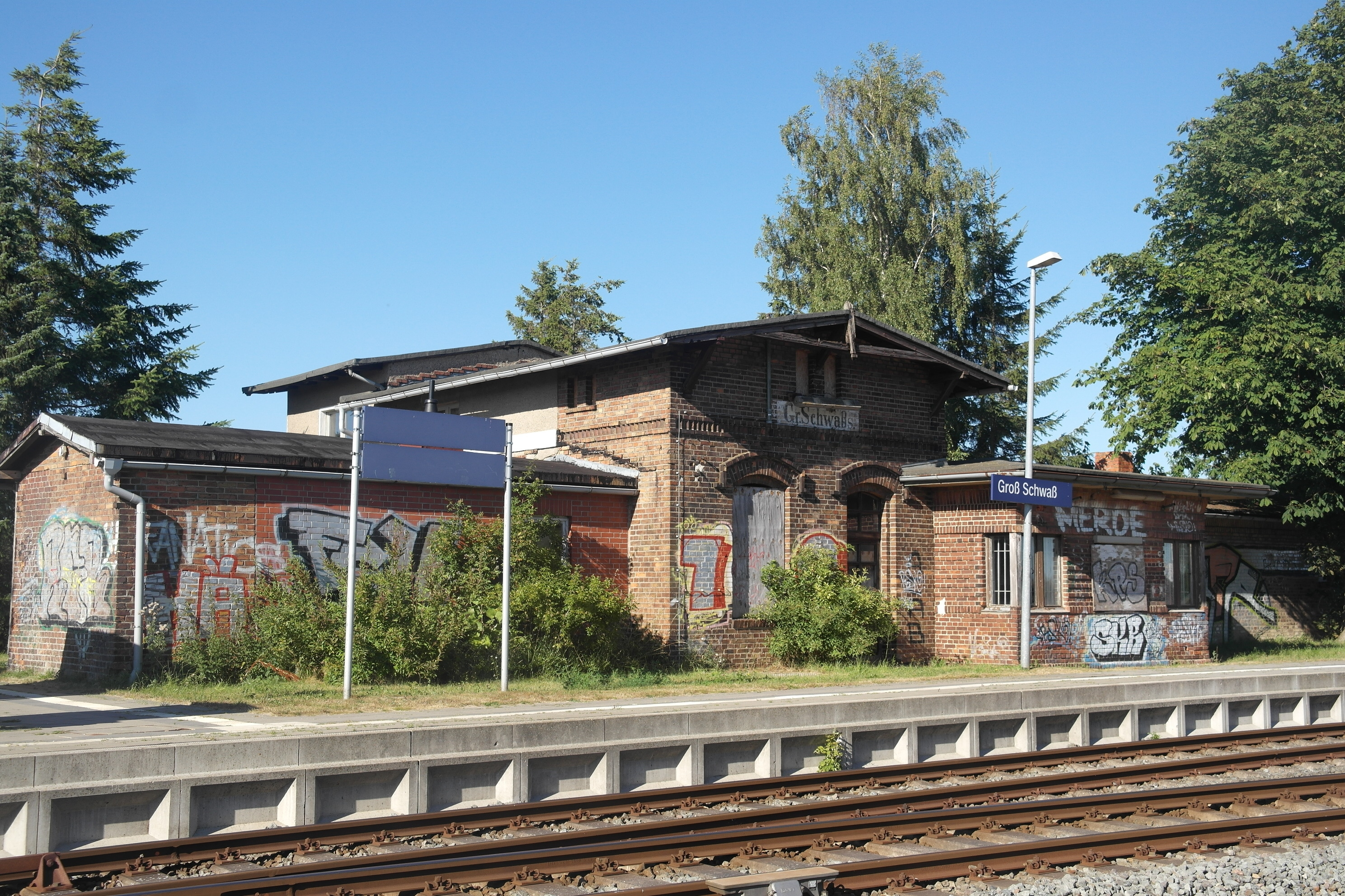 Bahnhof Groß Schwaß, denkmalgeschützt